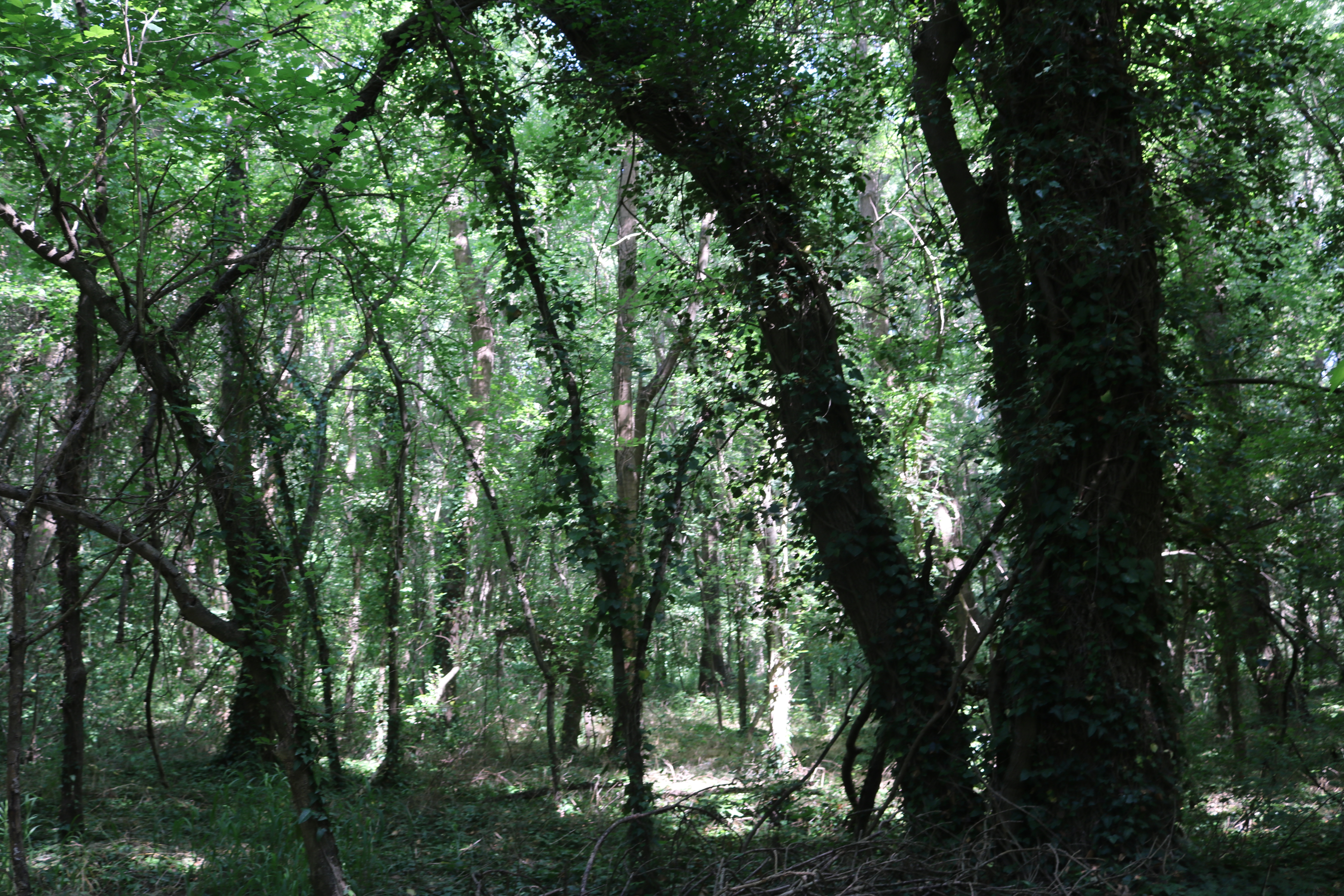 Балтата